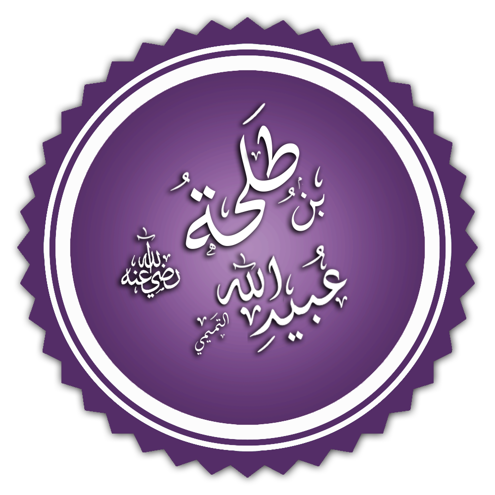 تخطيط اسم طلحة بن عبيد الله رضي الله عنه